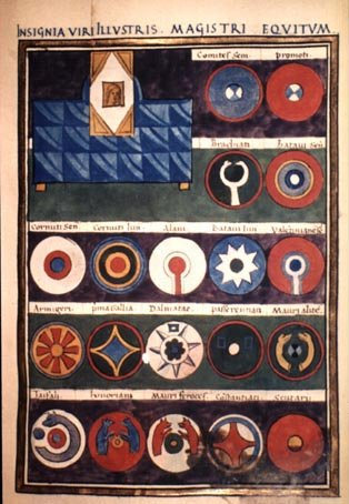 Magister Equitum page 1 from Notitia dignitatum